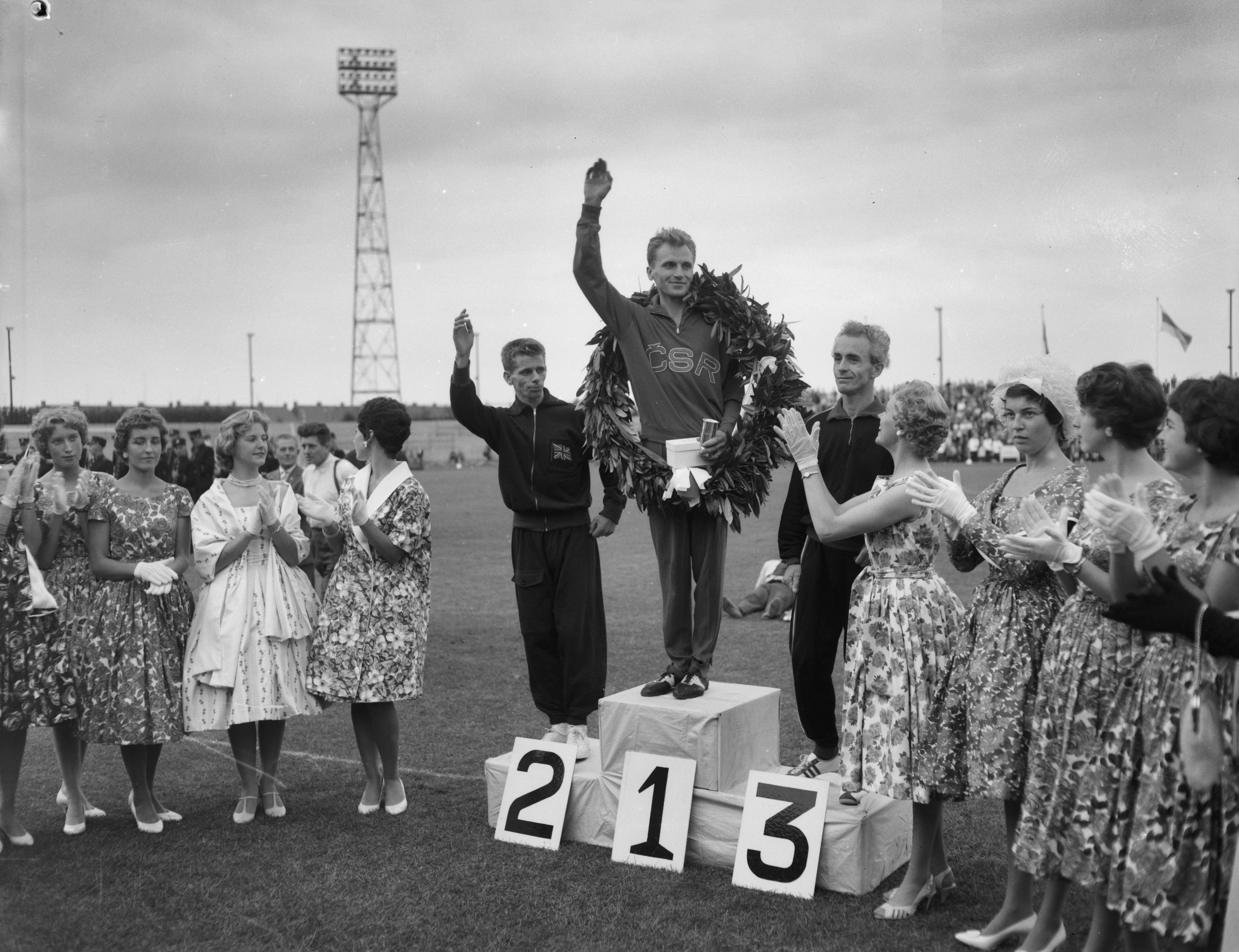 Collectie / Archief : Fotocollectie Anefo Reportage / Serie : [ onbekend ] Beschrijving : Zevende Internationale Marathonloop te Enschede, huldiging van de winnaars, v.l.n.r. Ken Pawson, Pavel Kantorek en Adolf Gruber Datum : 15 augustus 1959 Fotograaf : Noske, J.D. / Anefo Auteursrechthebbende : Nationaal Archief Materiaalsoort : Negatief (zwart/wit) Nummer archiefinventaris : bekijk toegang 2.24.01.04 Bestanddeelnummer : 910-5968